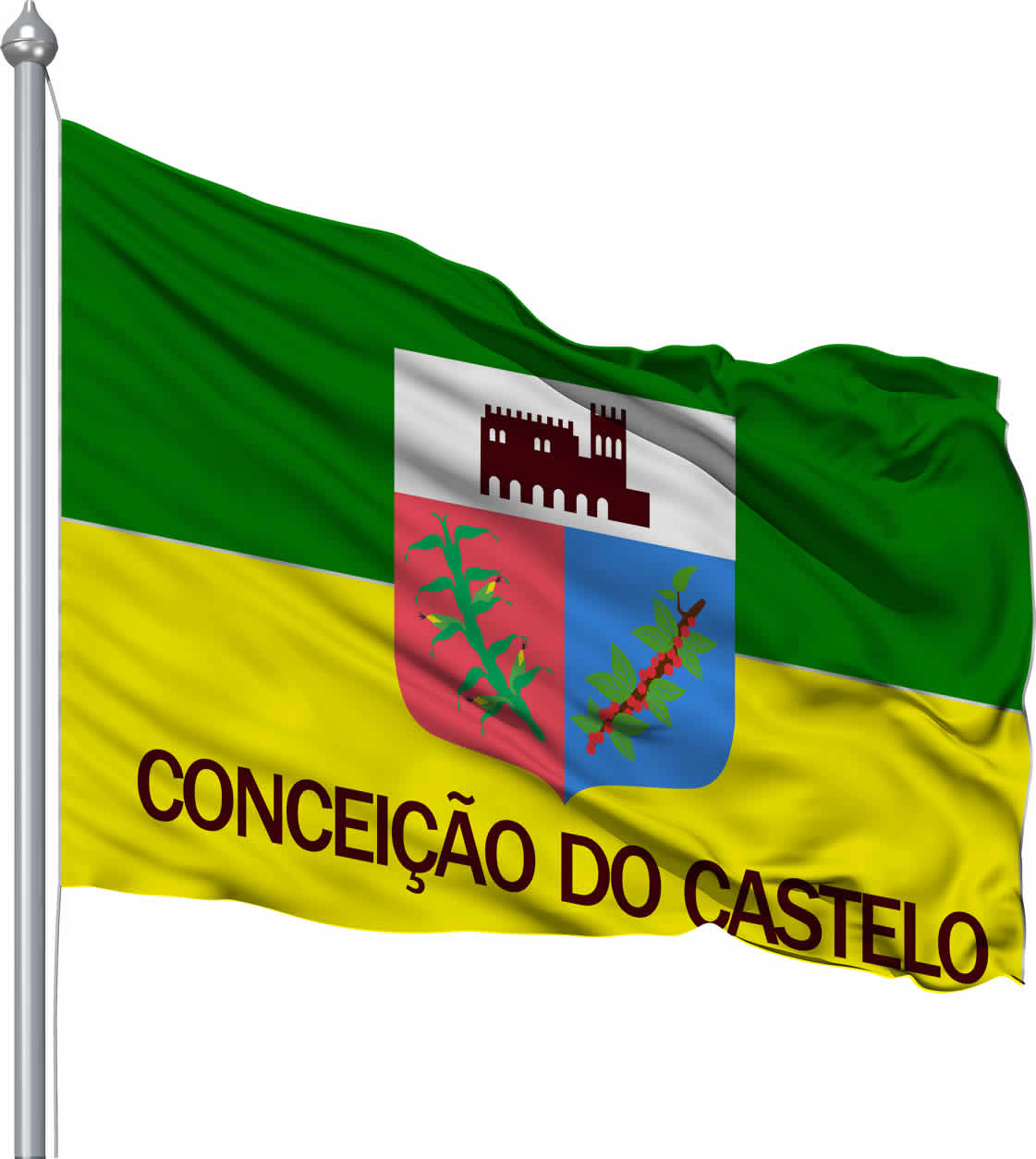 Bandeira do Município de Conceição do Castelo